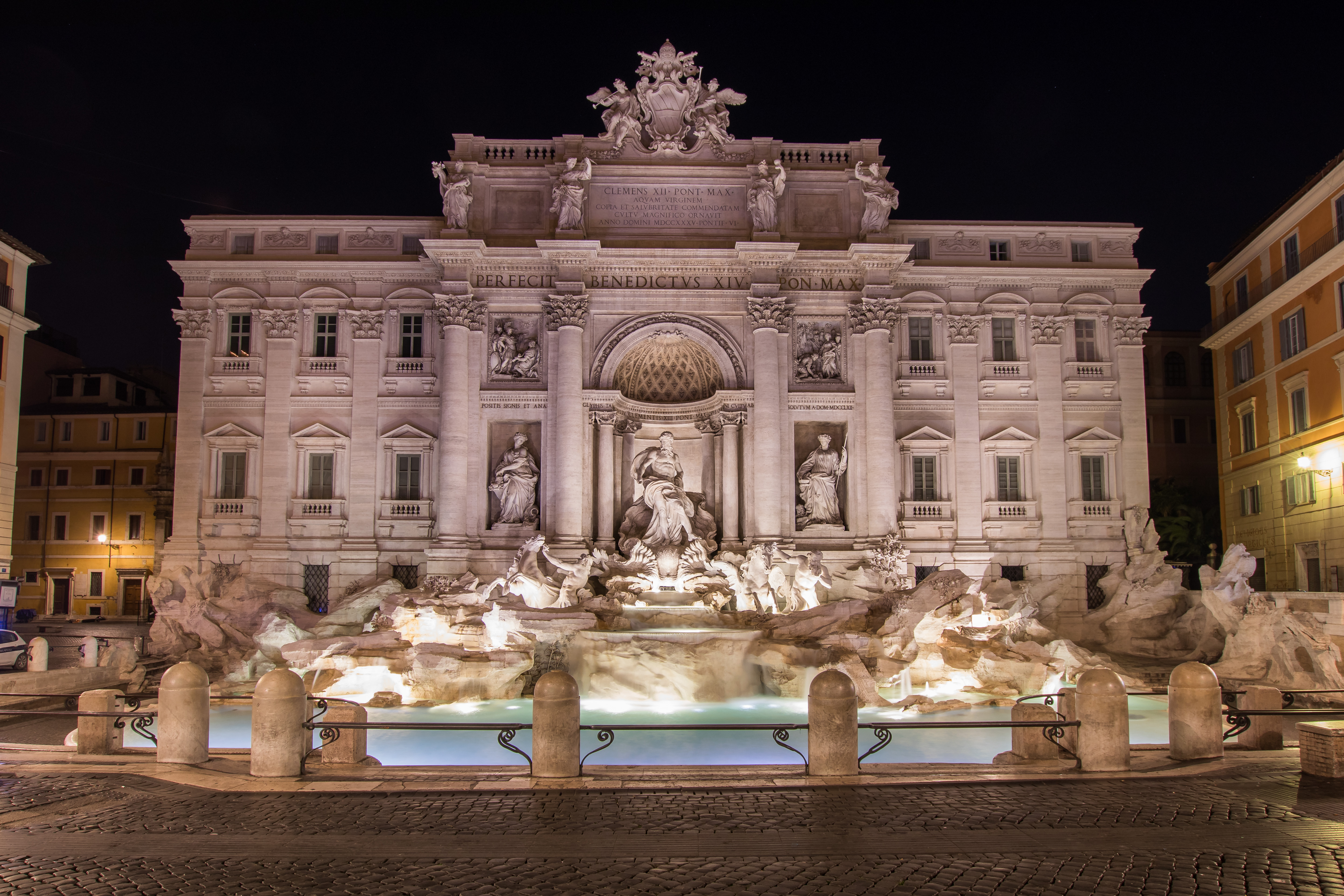 Fontana di Trevi (IMG_4022)